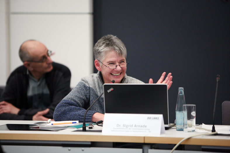 130319 Behindertenrechtskonvention 5-200dpi